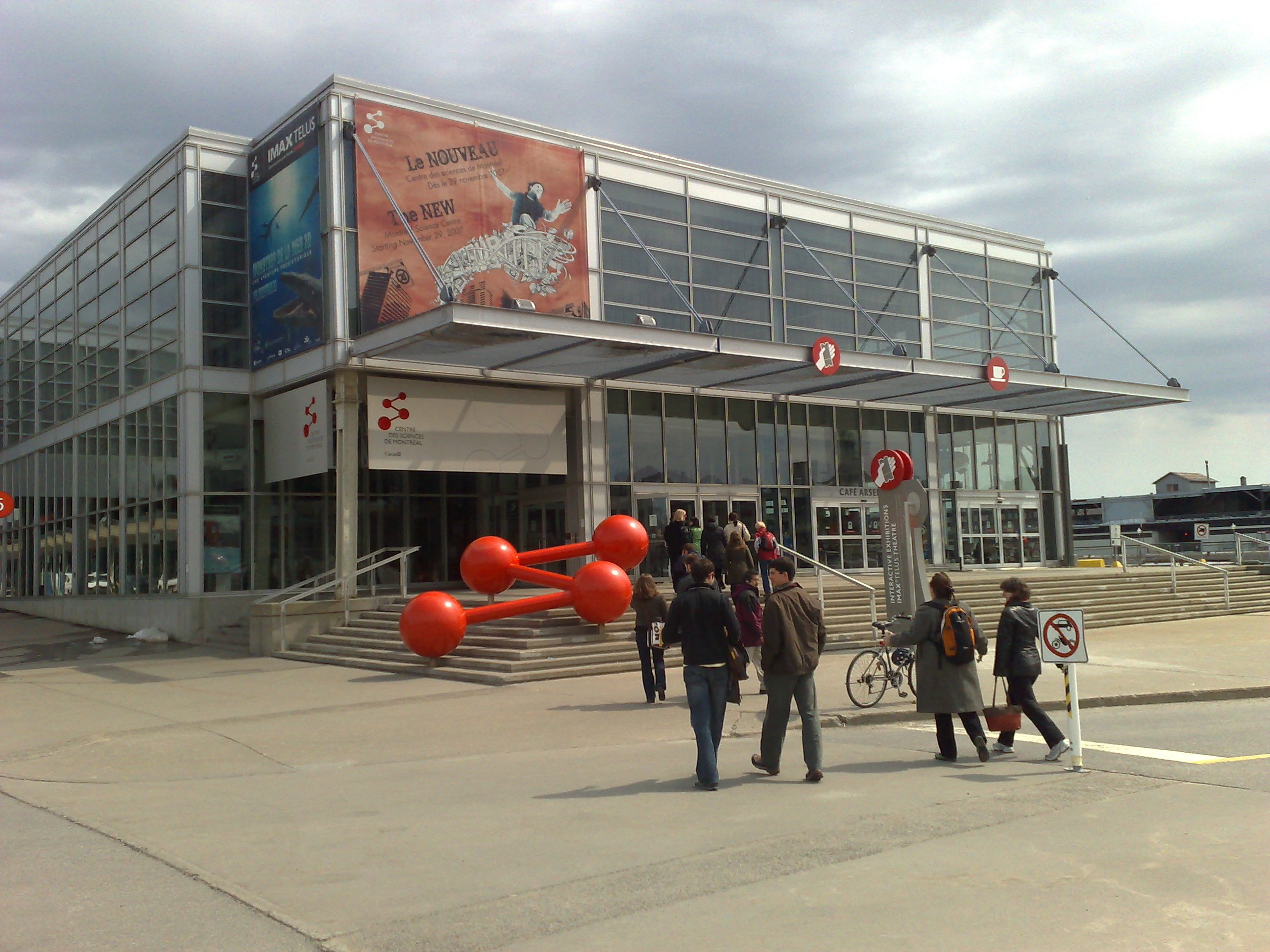 Centre des sciences de Montréal